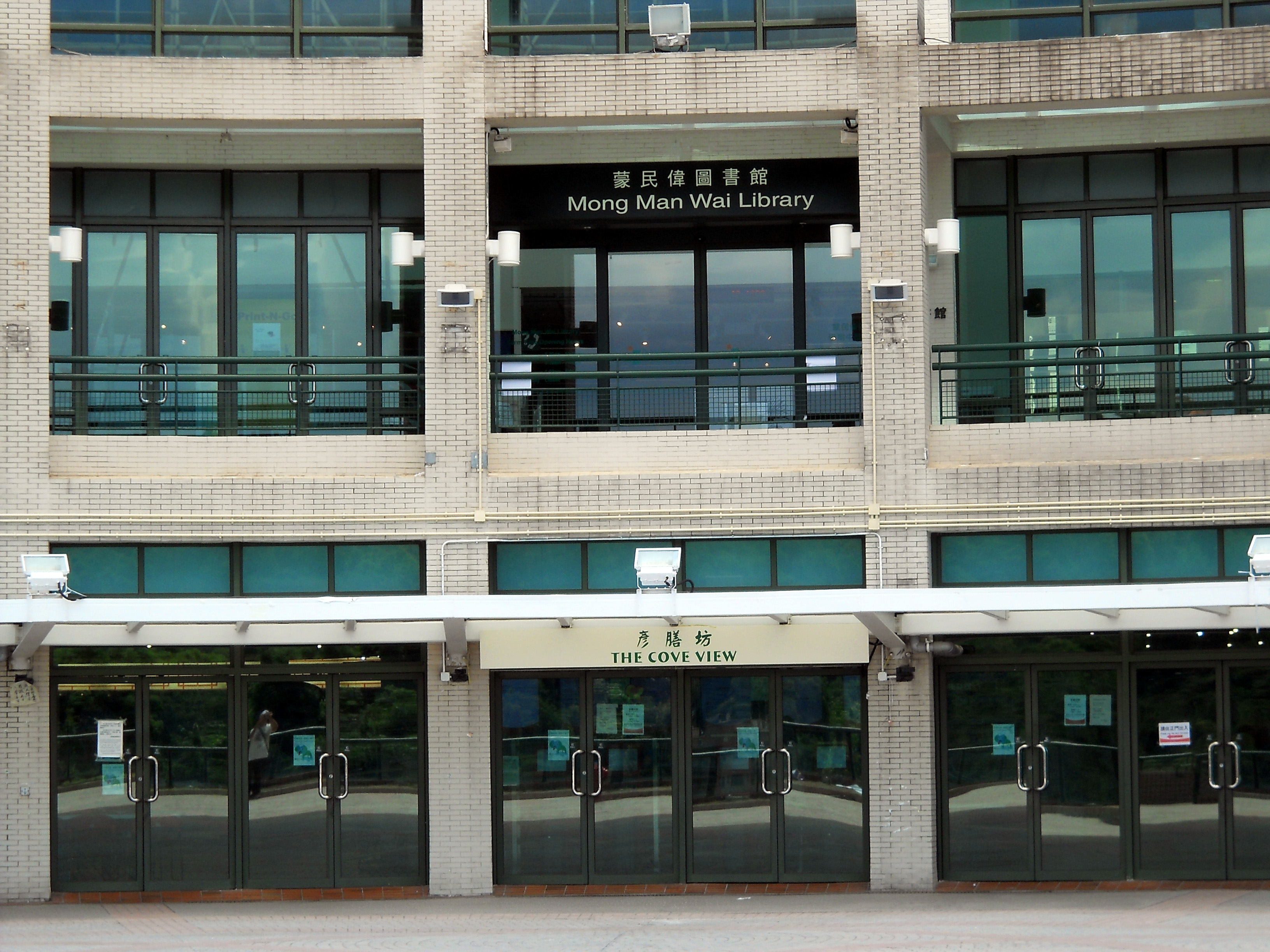 中文（香港）: 香港教育學院「蒙民偉圖書館」